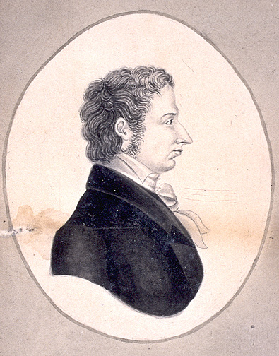 Icelandic philologian Sveinbjörn Egilsson (1791-1852).